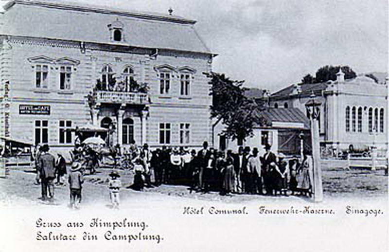 Hotel Comunal, Câmpulung